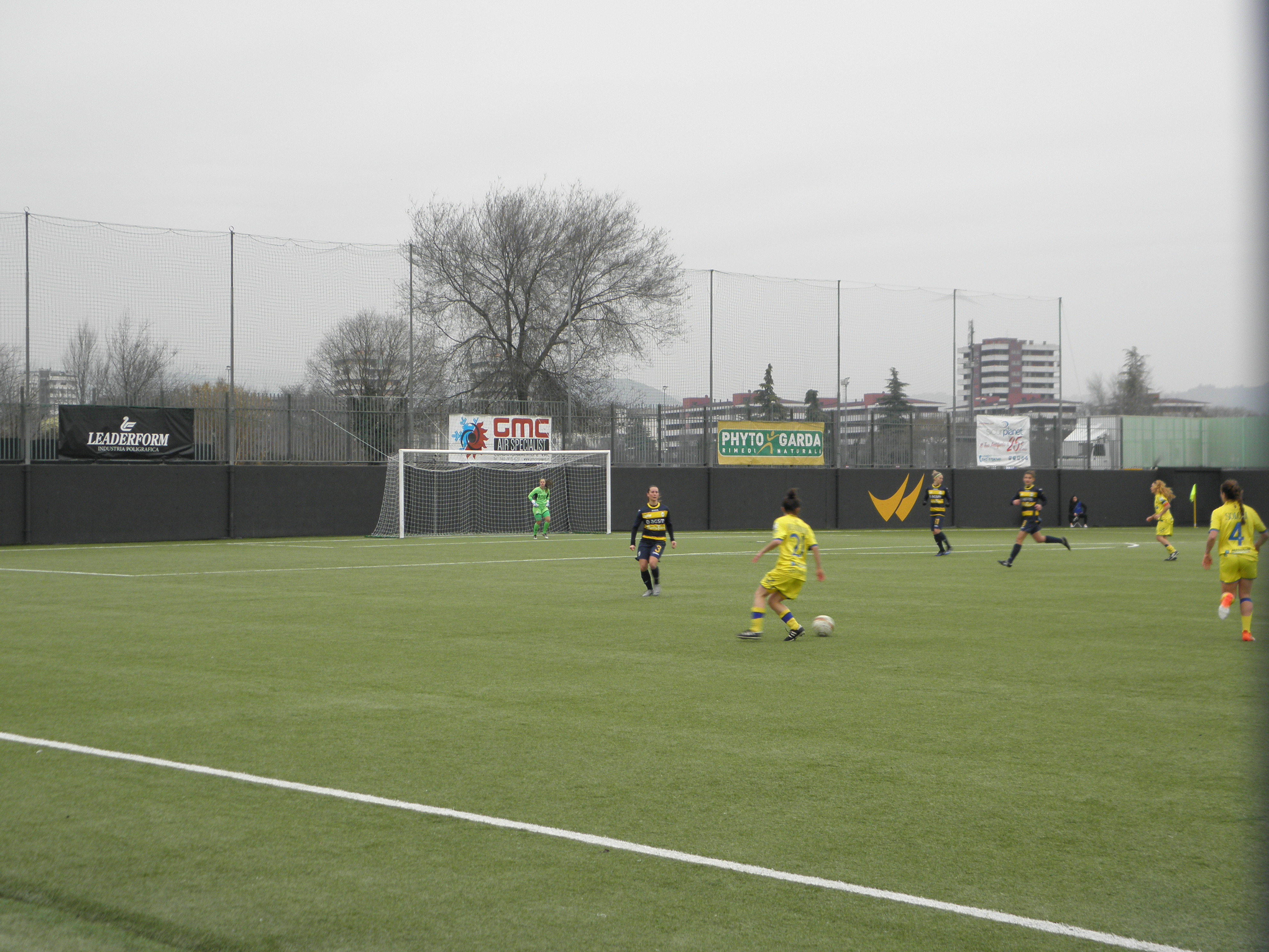 Verona, Stadio Aldo Olivieri: azione di gioco dell'incontro Fimauto Valpolicella - AGSM Verona del 17 febbraio 2018. Sono presenti nello scatto, da destra a sinistra, Diede Lemey, in porta, Julia Molin (3), Daiana Mascanzoni (21, di spalle, mossa), Osetta (11), Bardin (6), Boni (10), Solow (4)